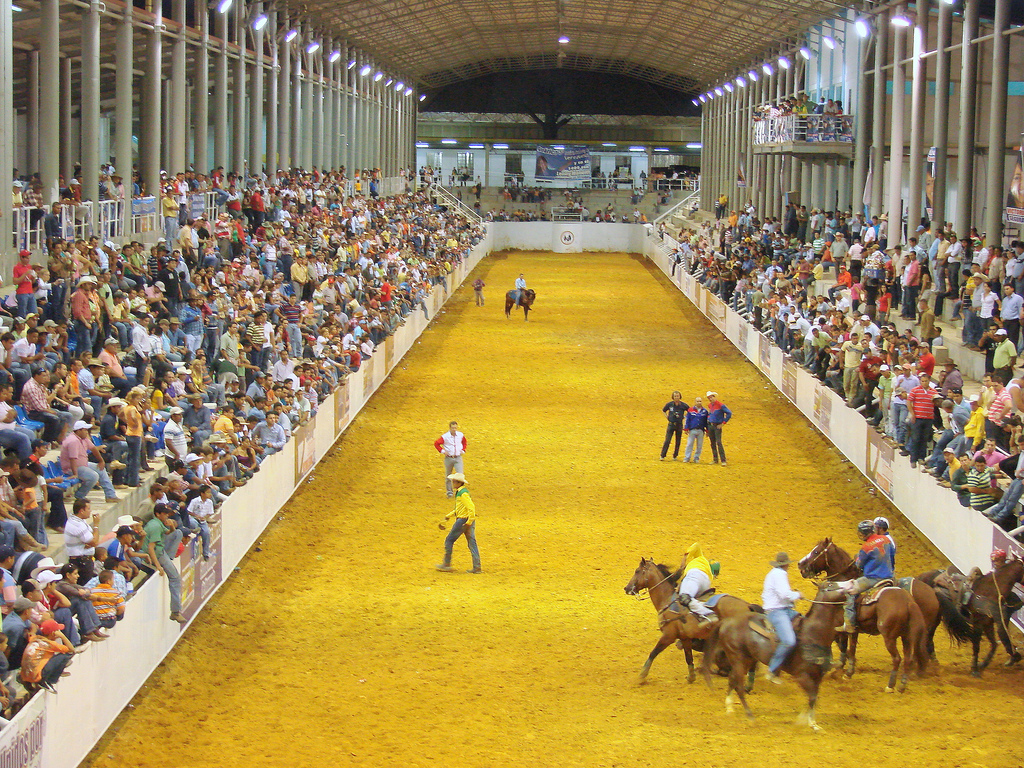 En San Juan de los Morros. Estado Guárico. Venezuela.